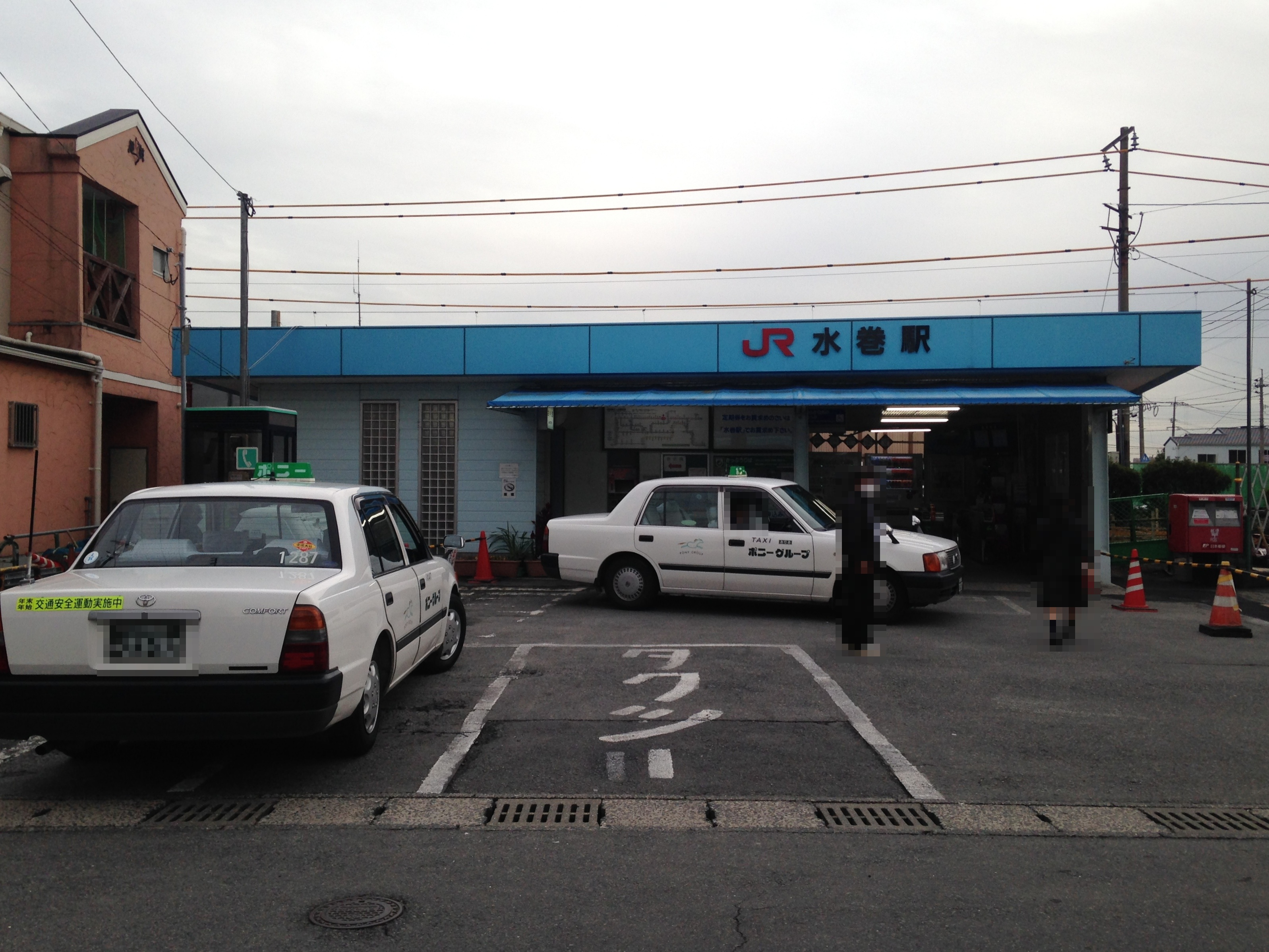 水巻駅駅舎